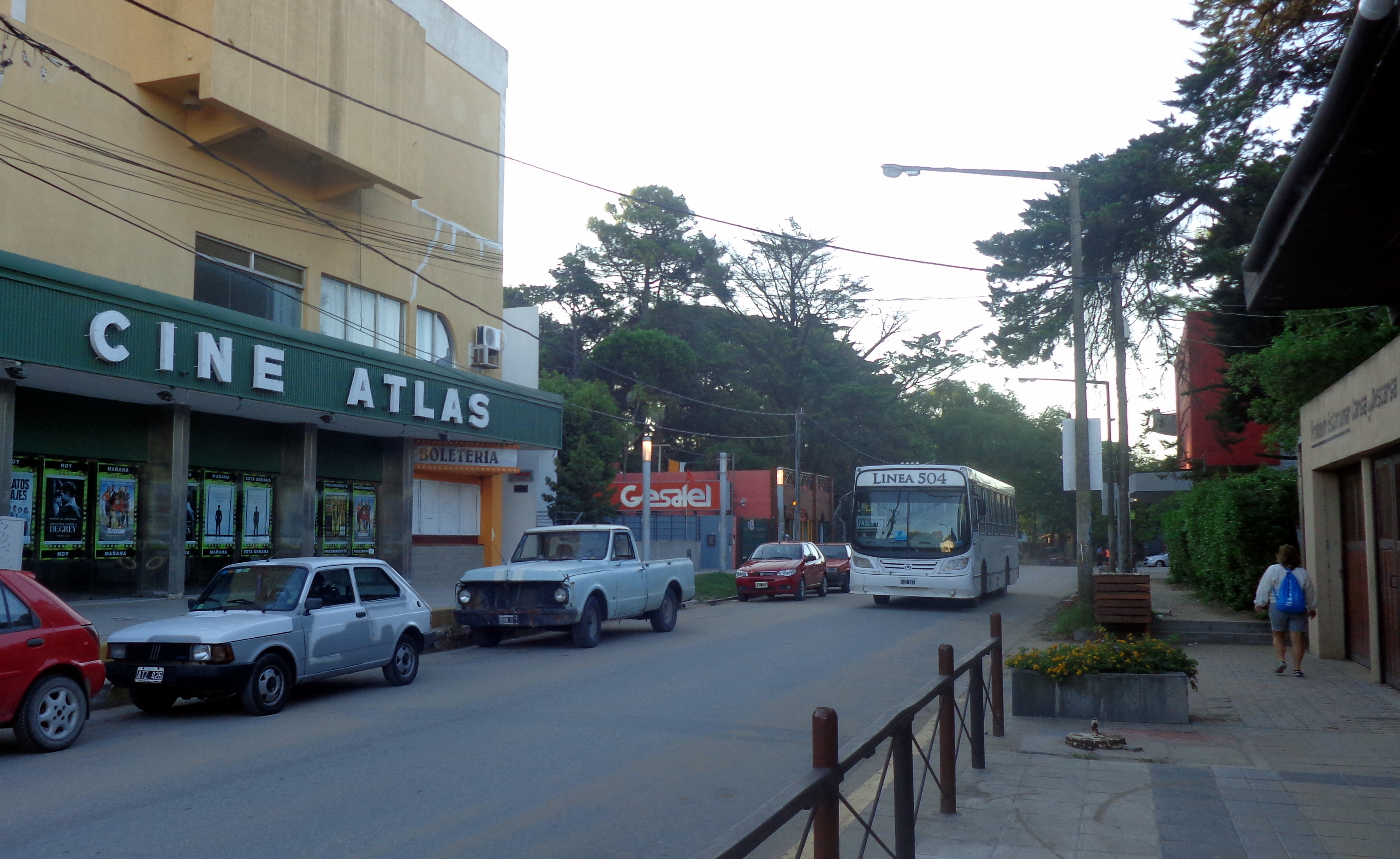 El colectivo 504 por la calle 108 y avenida 3, frente al cine Atlas, en Villa Gesell, Provincia de Buenos Aires, Argentina.